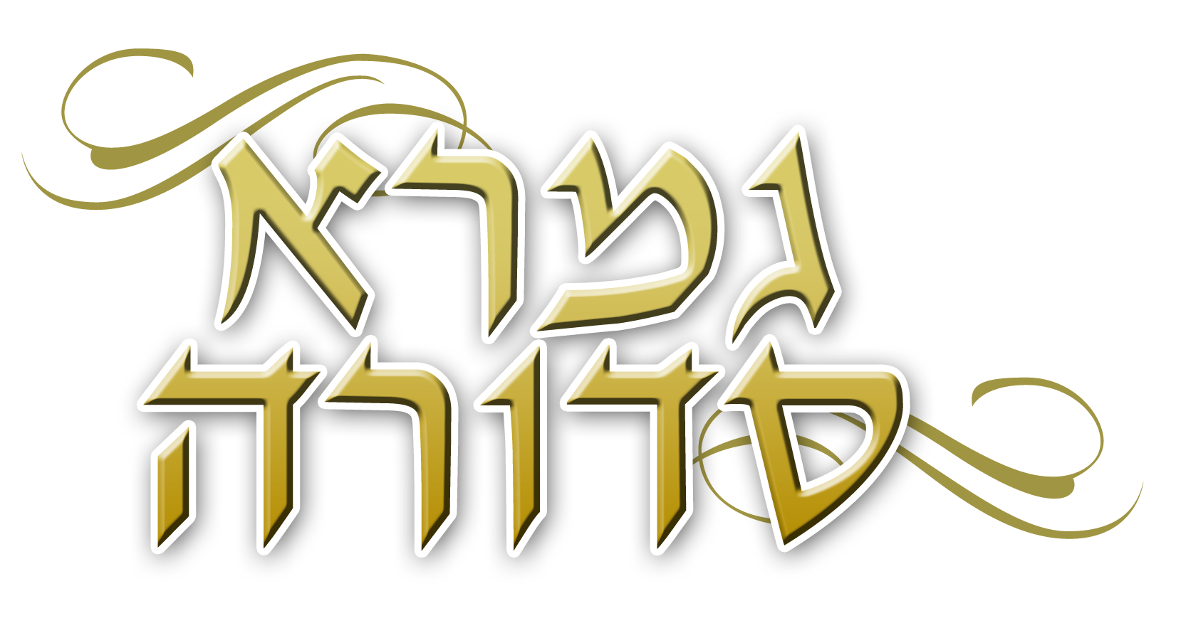 לוגו גמרא סדרה